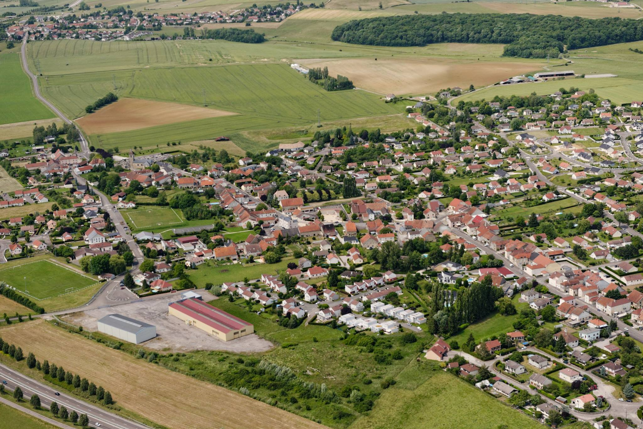 Pusey (Haute-Saône)